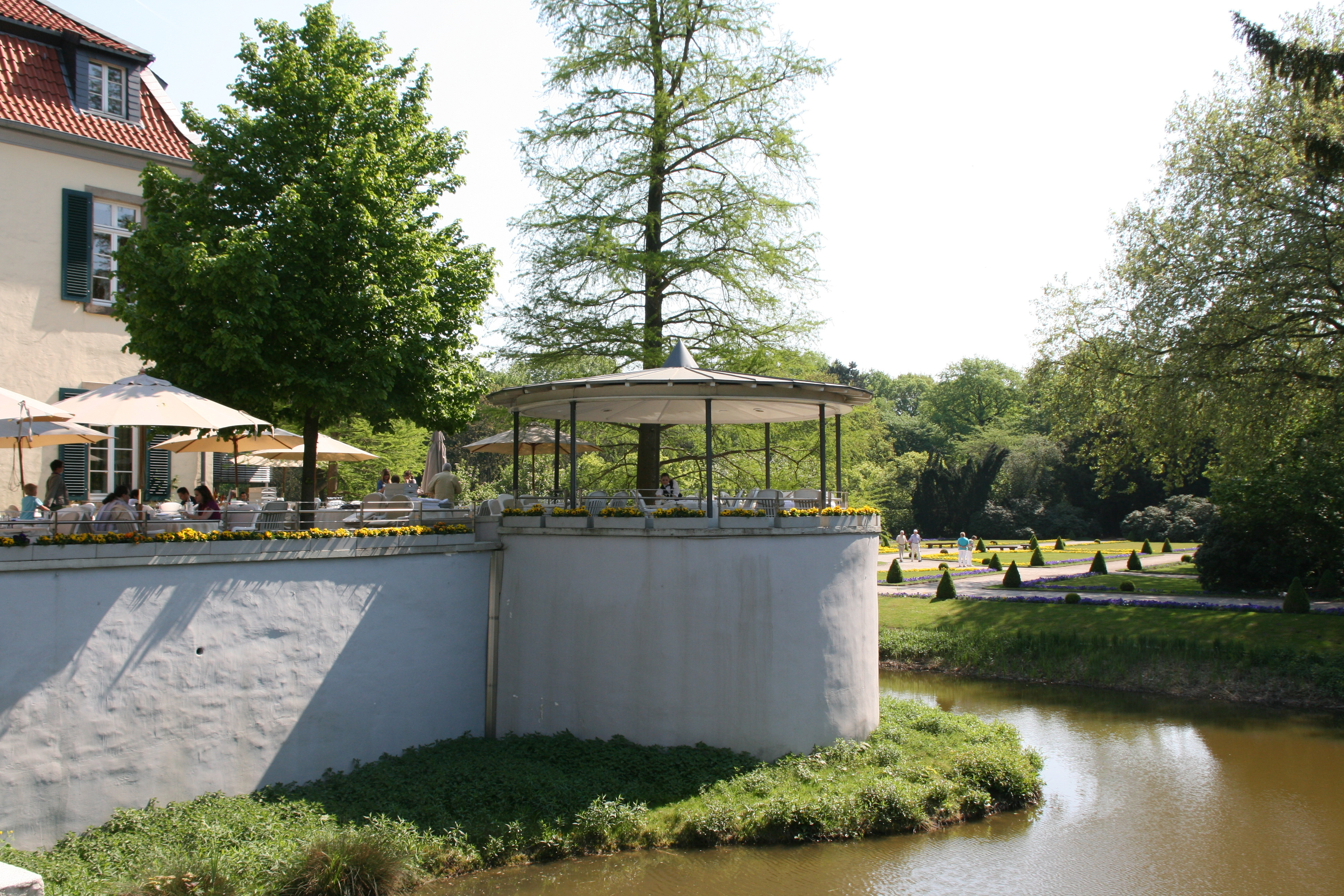 Schloss Berge, Adenauerallee 103 in Gelsenkirchen. Blick über den Wassergraben der Anlage in den Schlosspark. Der runde Pavillon an der Südwestecke der Burginsel ist der Überrest eines bis ins späte 18. Jh. noch vorhandenen Rundturms.